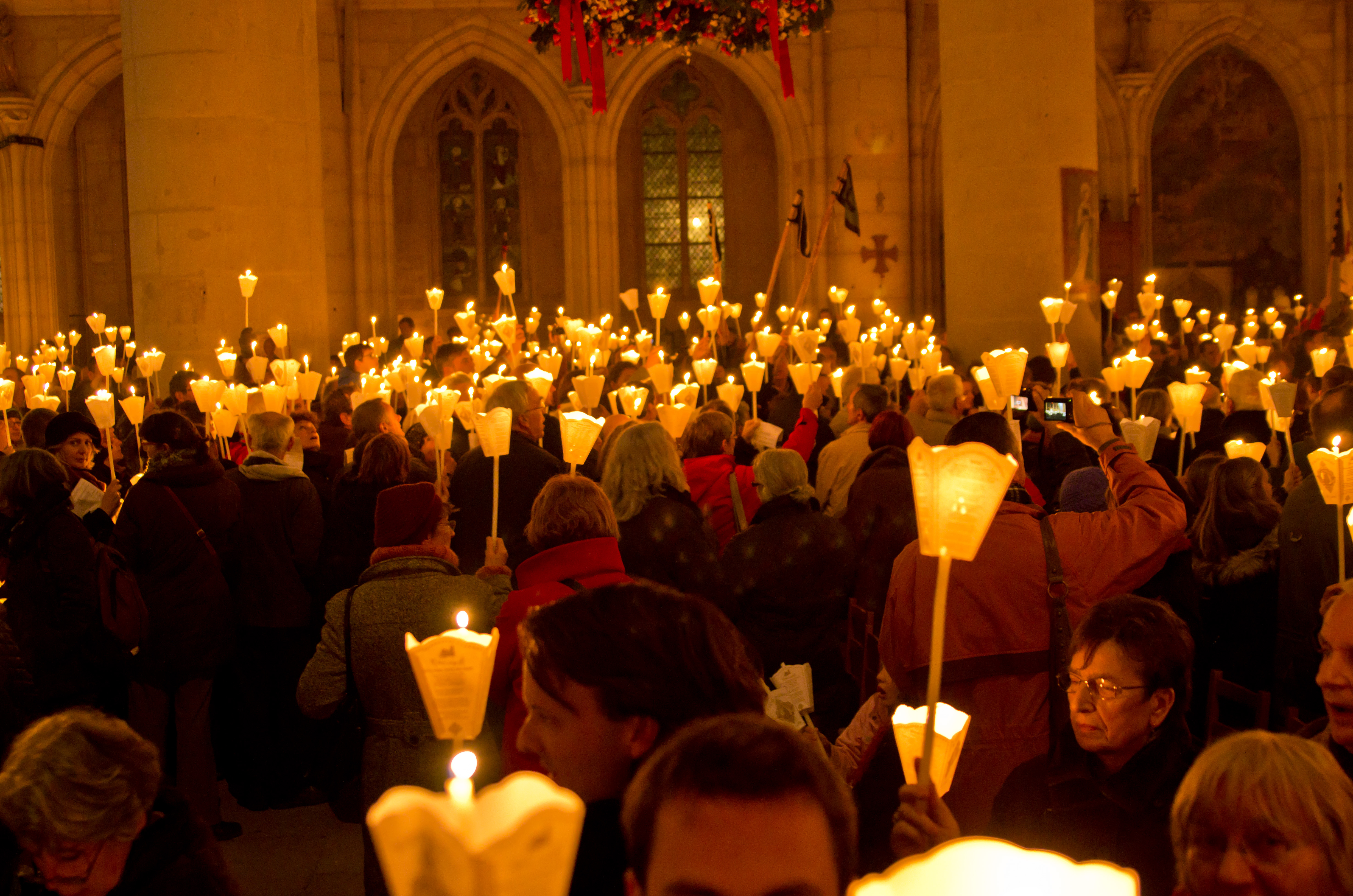 La procession annuelle de Saint Nicolas en la basilique de Saint-Nicolas-de-Port (2011)